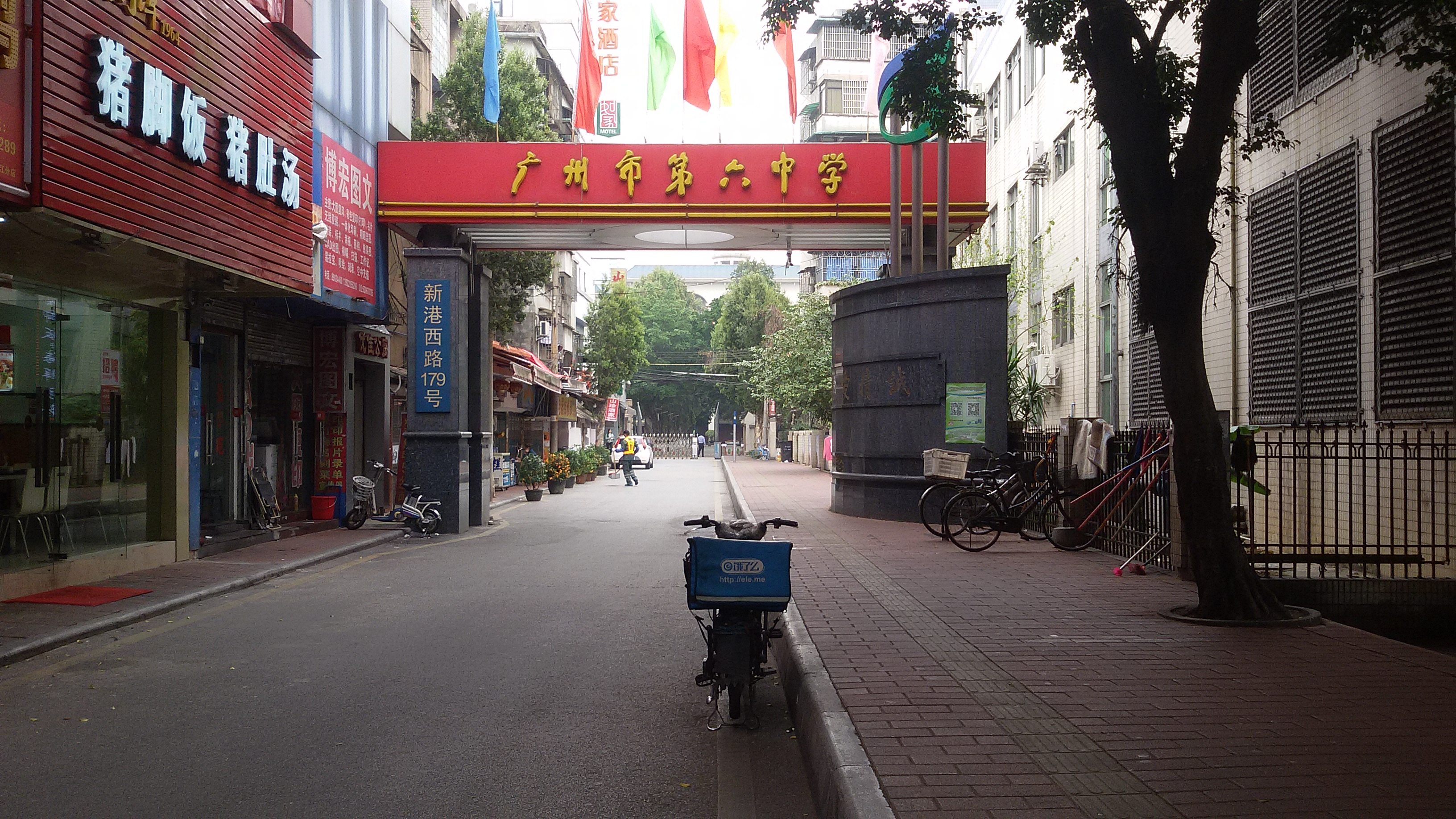 粵語: 广州市第六中学大门